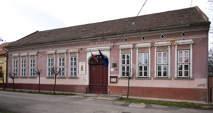 Hódmezővásárhelyi Nemzetközi Kerámia Központ